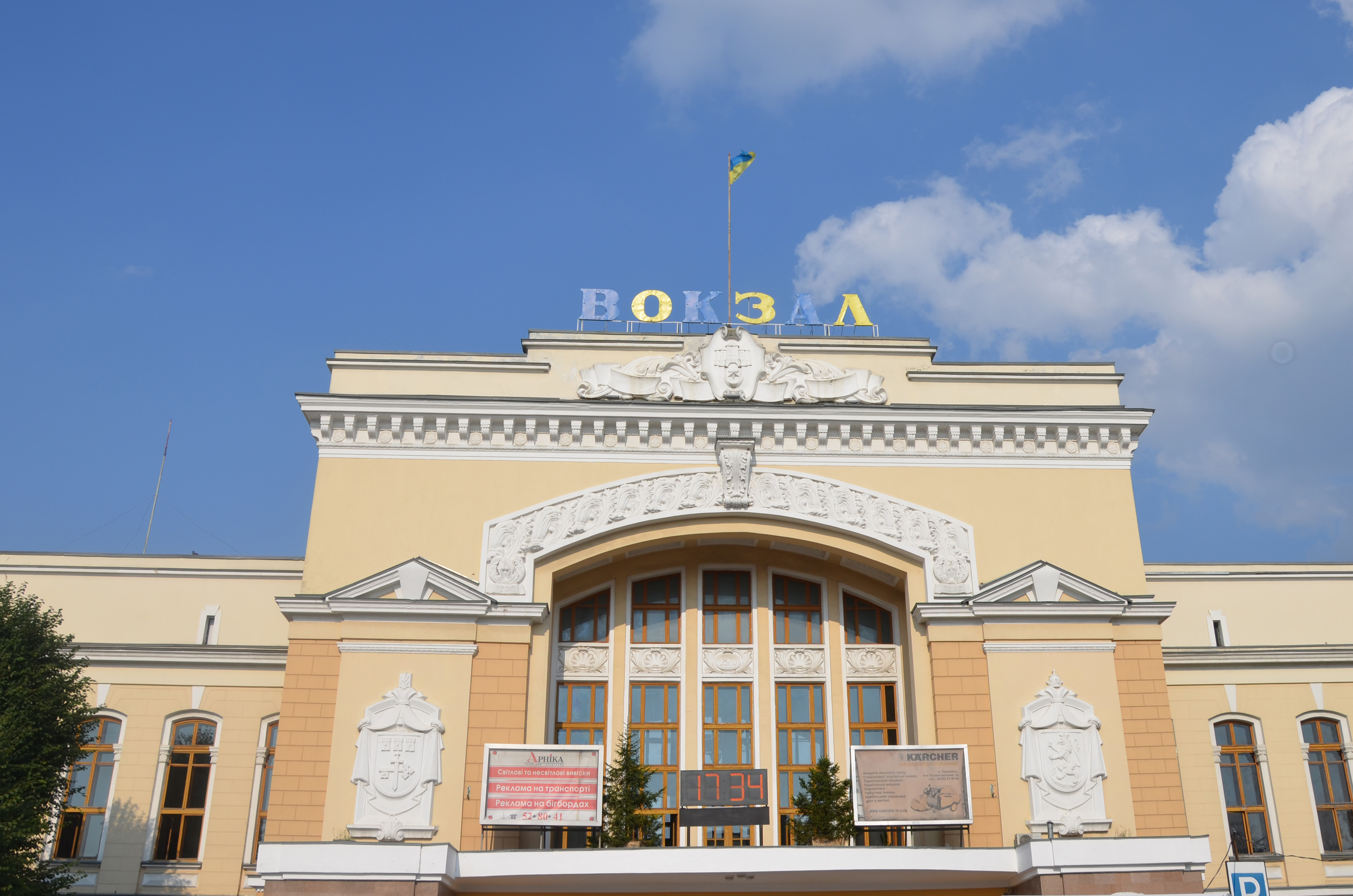 Вокзал у Тернополі- пам'ятка архітектури.